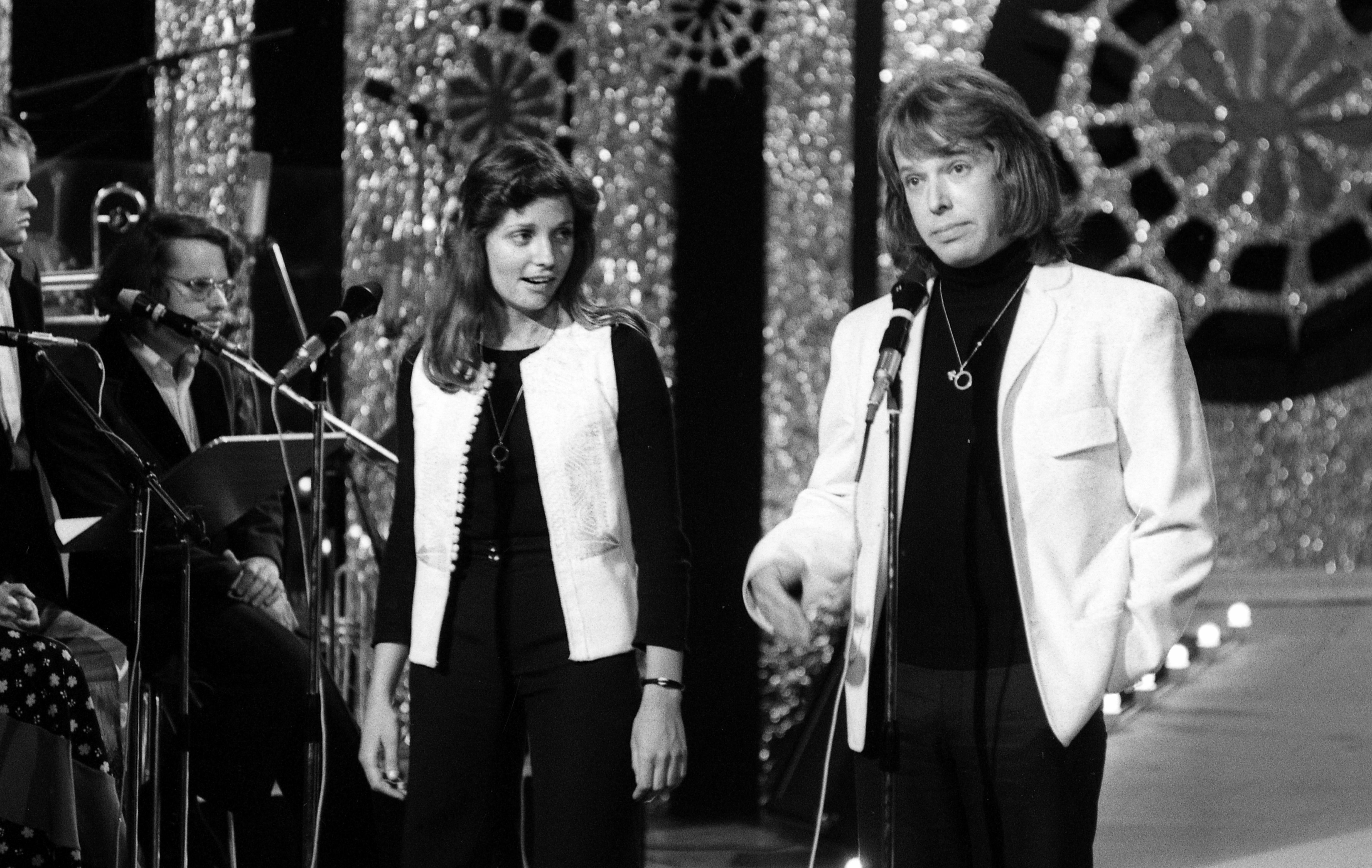 Melodi Grand Prix, norsk finale i TV-studio 1 NRK, 1974. Fra generalprøven. Foto: Petter R. Iversen. Arkivref.: PA-0797_U_7631_014_037